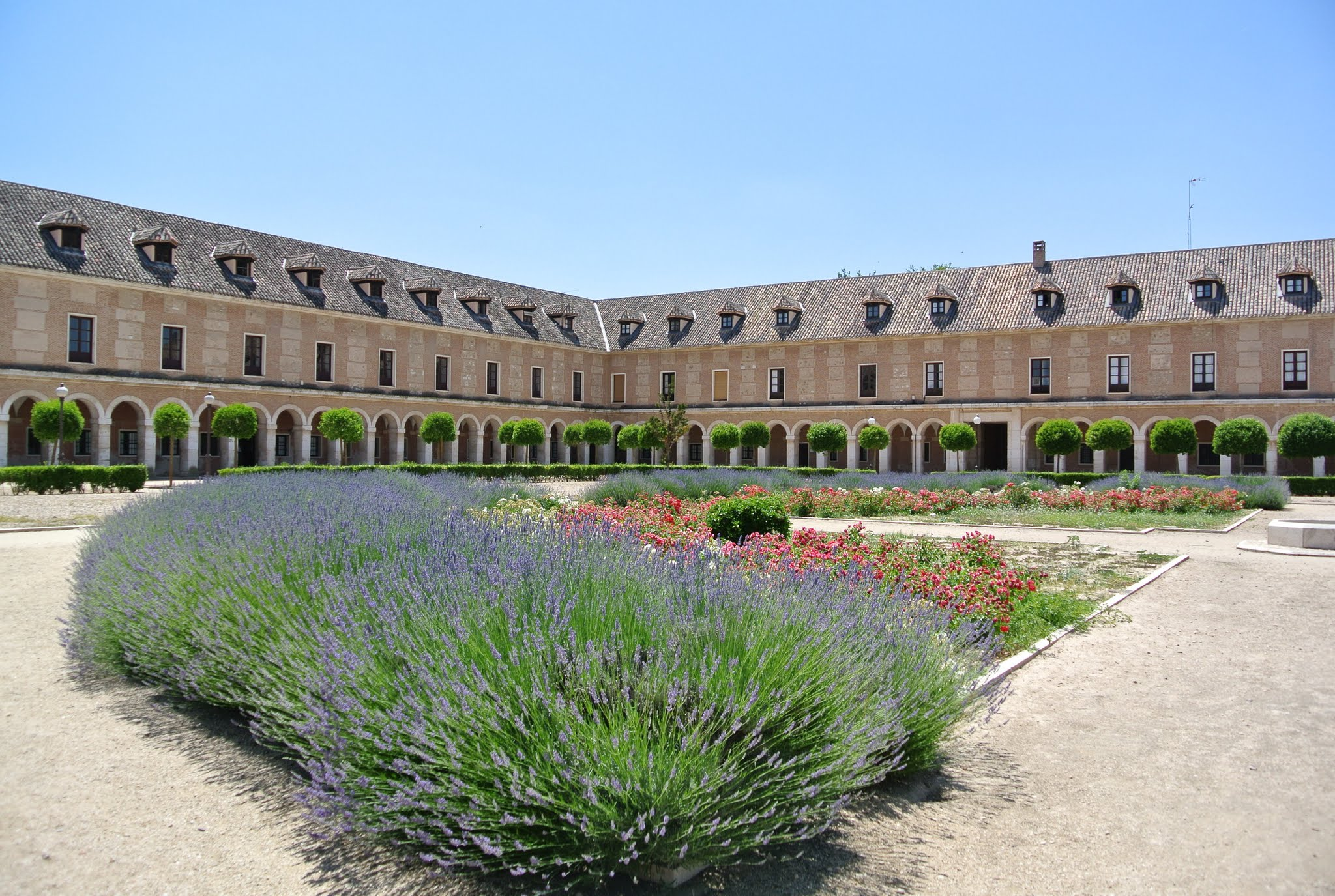 Aranjuez, Madrid, Spain